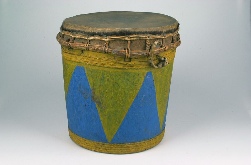 Slaginstrument. Heeft onderdeel uitgemaakt van een orkest met angkloengs erbij en met de onder nummer 410 t/m 412 beschreven snaarinstrumenten uit deze serie.. Enkelvellige cilindrische trom Unknown language: Dogdog